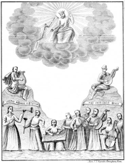 Ілюстрація з панегірика Тимофію Максимовичу.